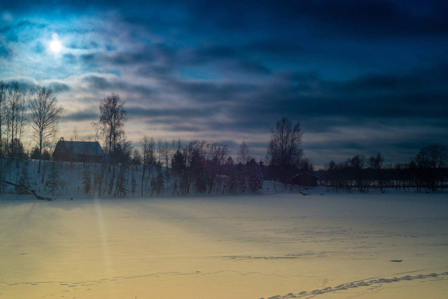 Река Мста. Озеро Мстино: Вышневолоцкий район, Тверская область This image is related to the protected area of Russia number 6910204